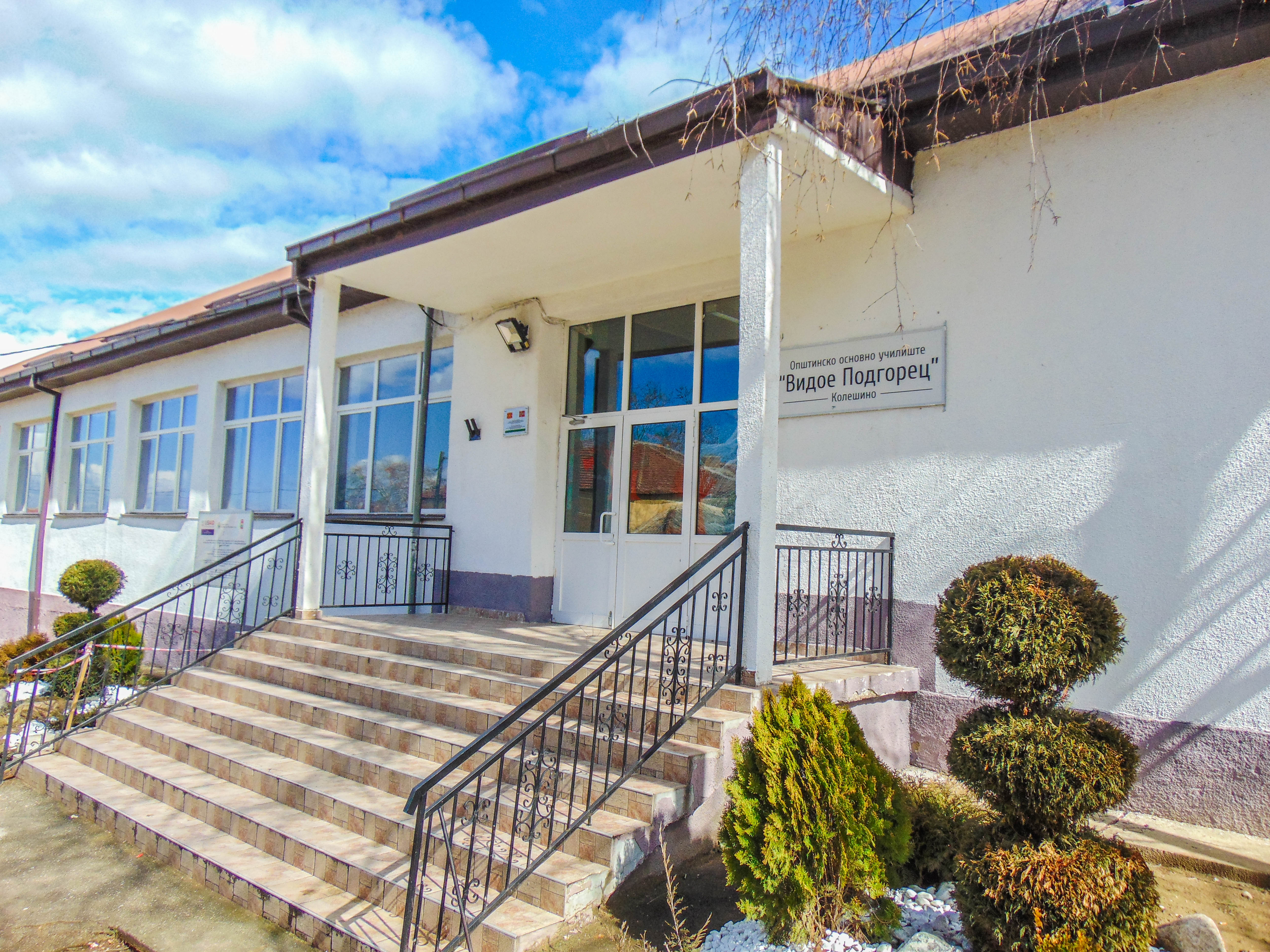 ОУ "Видое Подгорец" - Колешино